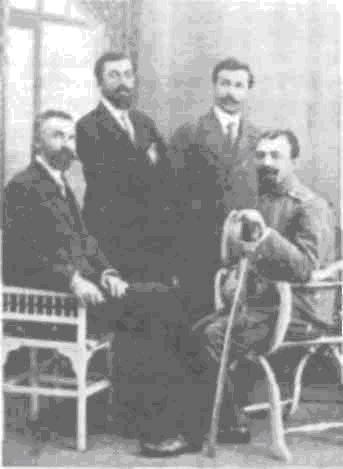 Sprostranovi Family